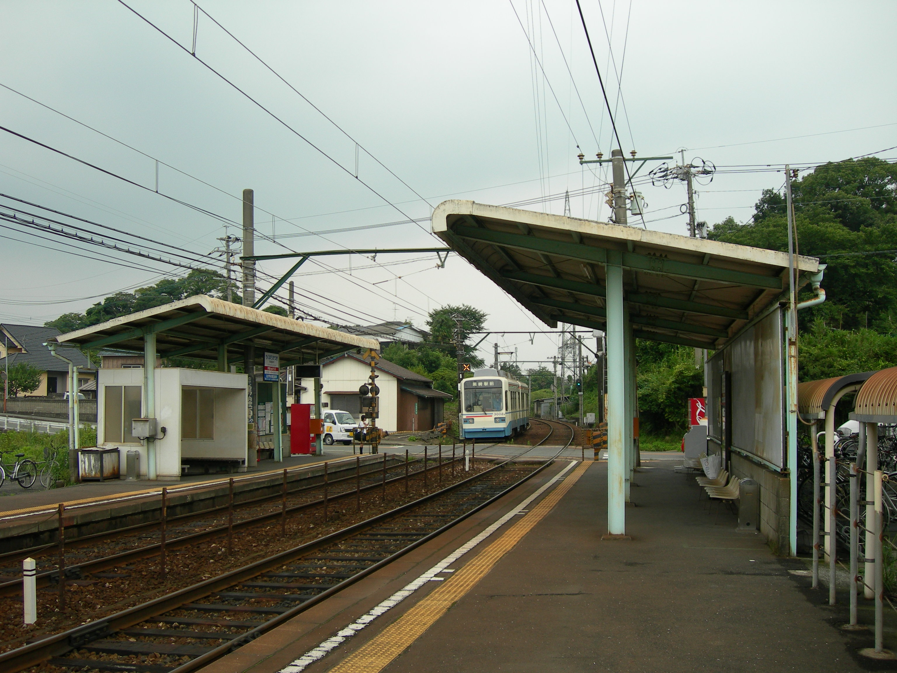 筑豊香月駅